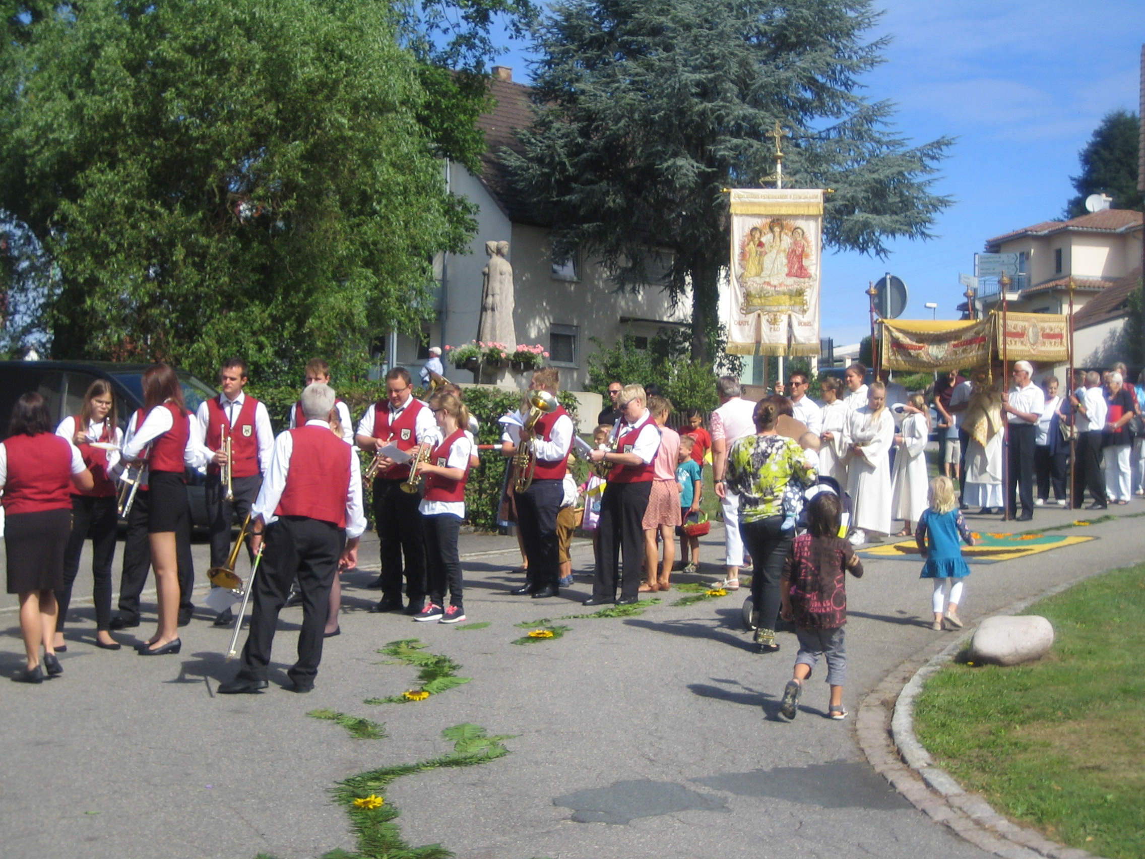 Eichsler Umgang 2017; Aufstellung der Prozessionsteilnehmer